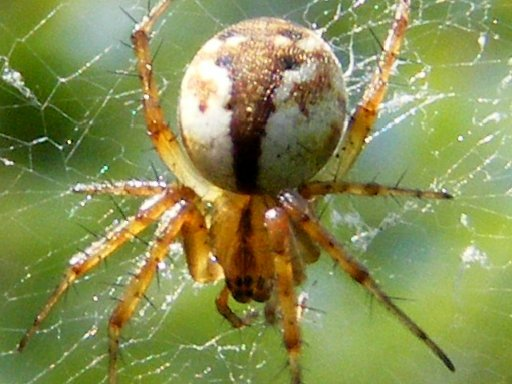 Mangora placida : Photographiés dans la région montréalaise les 7 juin et 7 juillet 2011, sur Fujifilm FinePix S700.